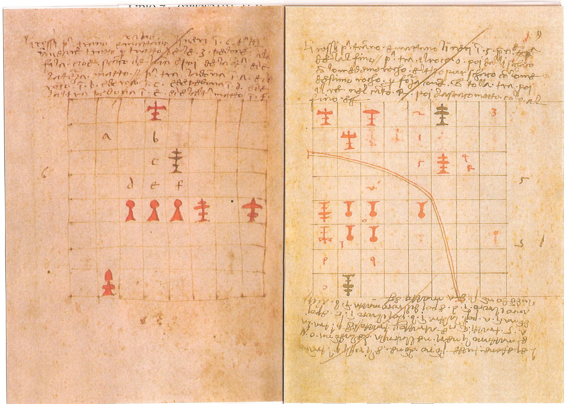 One page of the booklet De Ludo Scachorum by Fra’ Luca Bartolomeo de Pacioli